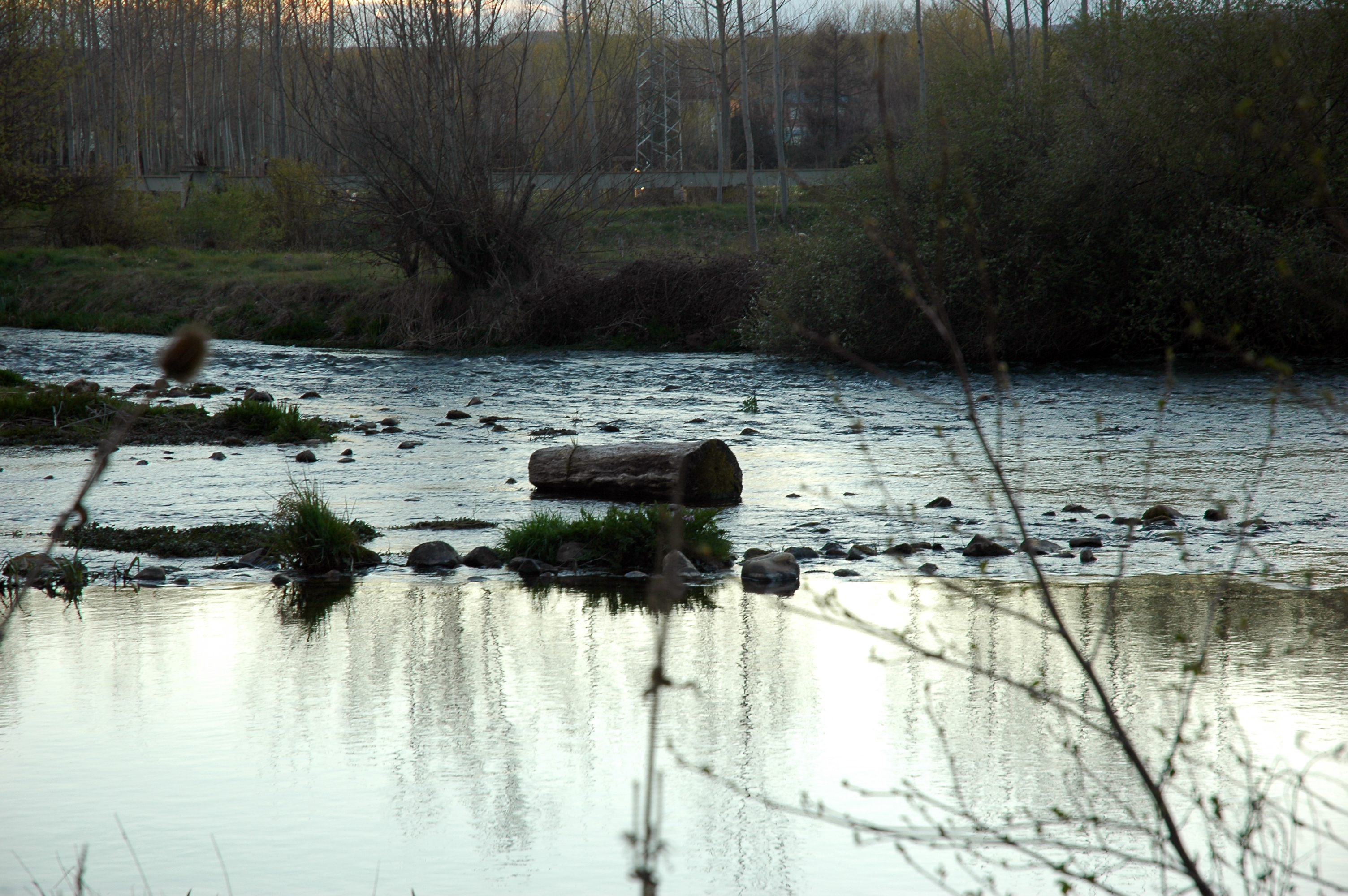 El rçio Luna a su paso por Santiago del Molinillo (Leon, España)en el atardecer